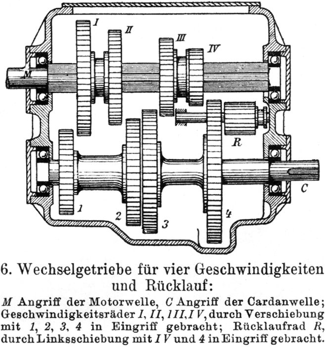 Wechselgetriebe für vier Geschwindigkeiten und Rücklauf: M Angriff der Motorwelle, C Angriff der Cardanwelle; Geschwindigkeitsräder I, II, III, IV, durch Verschiebung mit 1, 2, 3, 4 in Eingriff gebracht; Rücklaufrad R, durch Linksschiebung mit IV und 4 in Eingriff gebracht.